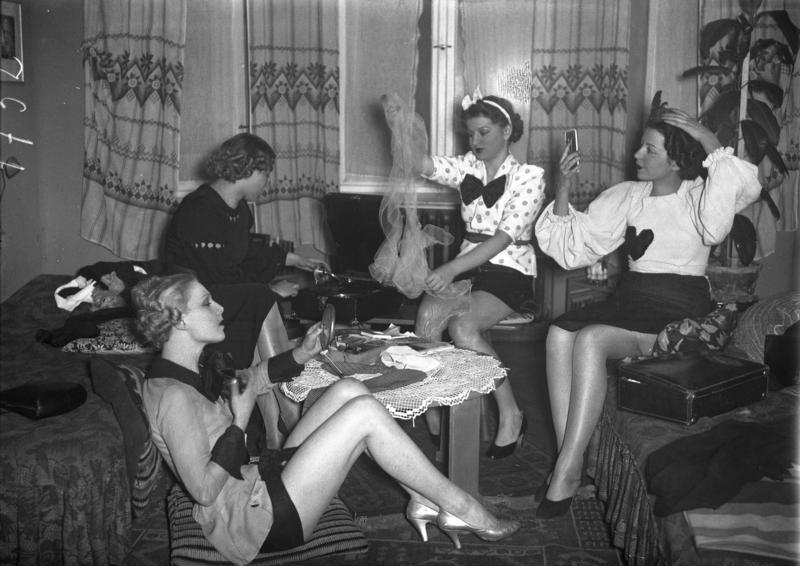 Berlin 1934 Beginn der Ballsaison: Lösung ist gefunden.